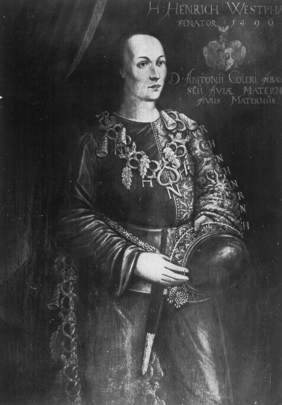 Bildnis des Dr.Anton Köhler (1542-1657). Als Bürgermeister in den Rat gewählt 1642.jpg Der Lübecker Ratsherr Heinrich Westval im mittelalterlichen Schellenkostüm. Bildnis um 1640 nach einer älteren Vorlage.